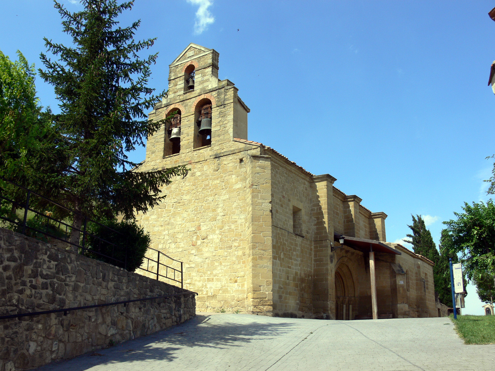 Iglesia de la Concepción en Ochánduri, La Rioja - España.